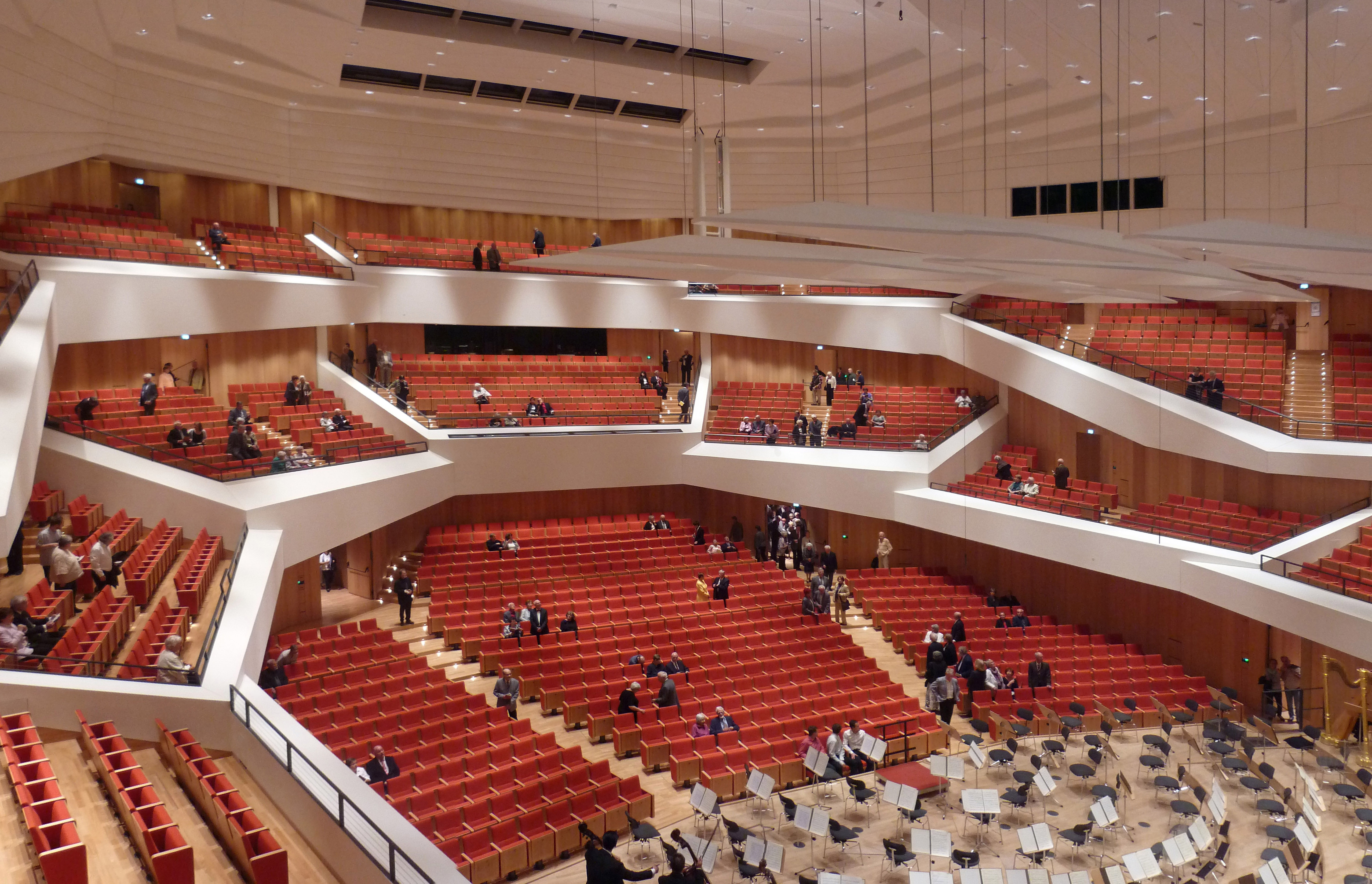 Kulturpalast Dresden nach der Wiedereröffnung am 28. April 2017: Neuer Konzertsaal